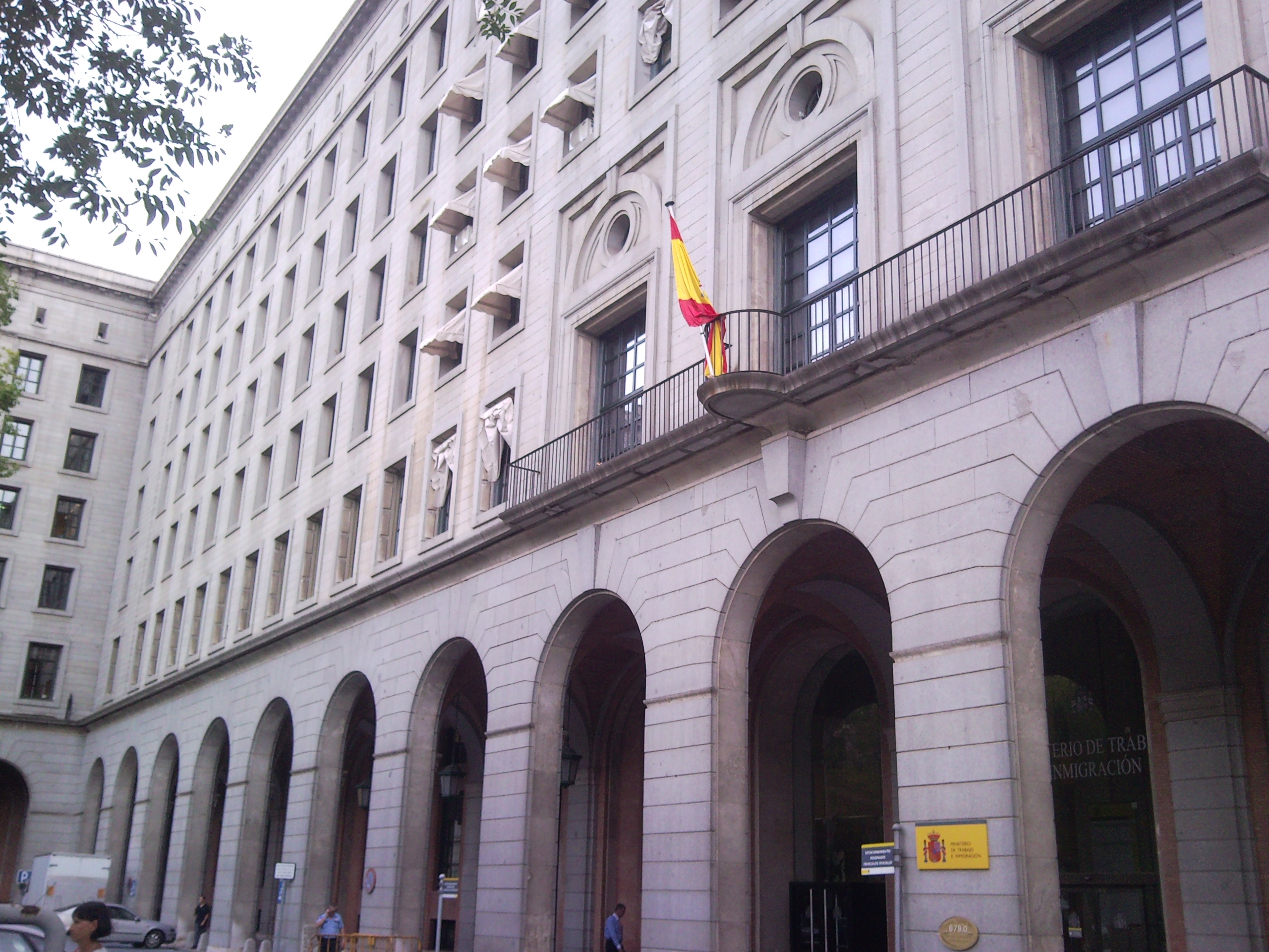 Ministerio de Trabajo e Inmigración de España - Sede central en el complejo de Nuevos Ministerios - Paseo de la Castellana 67, Madrid.